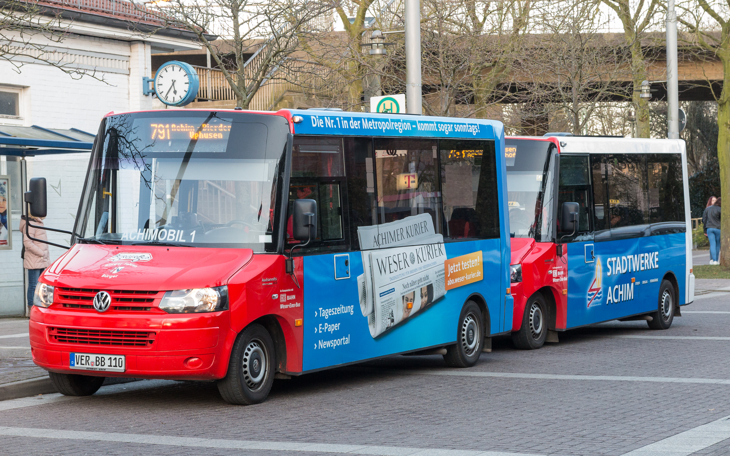 Die Bürgerbusse Achimobil 1 und Achimobil 2 warten am Bahnhof Achim unter dem Motto "Bürger fahren Bürger" auf Fahrgäste.